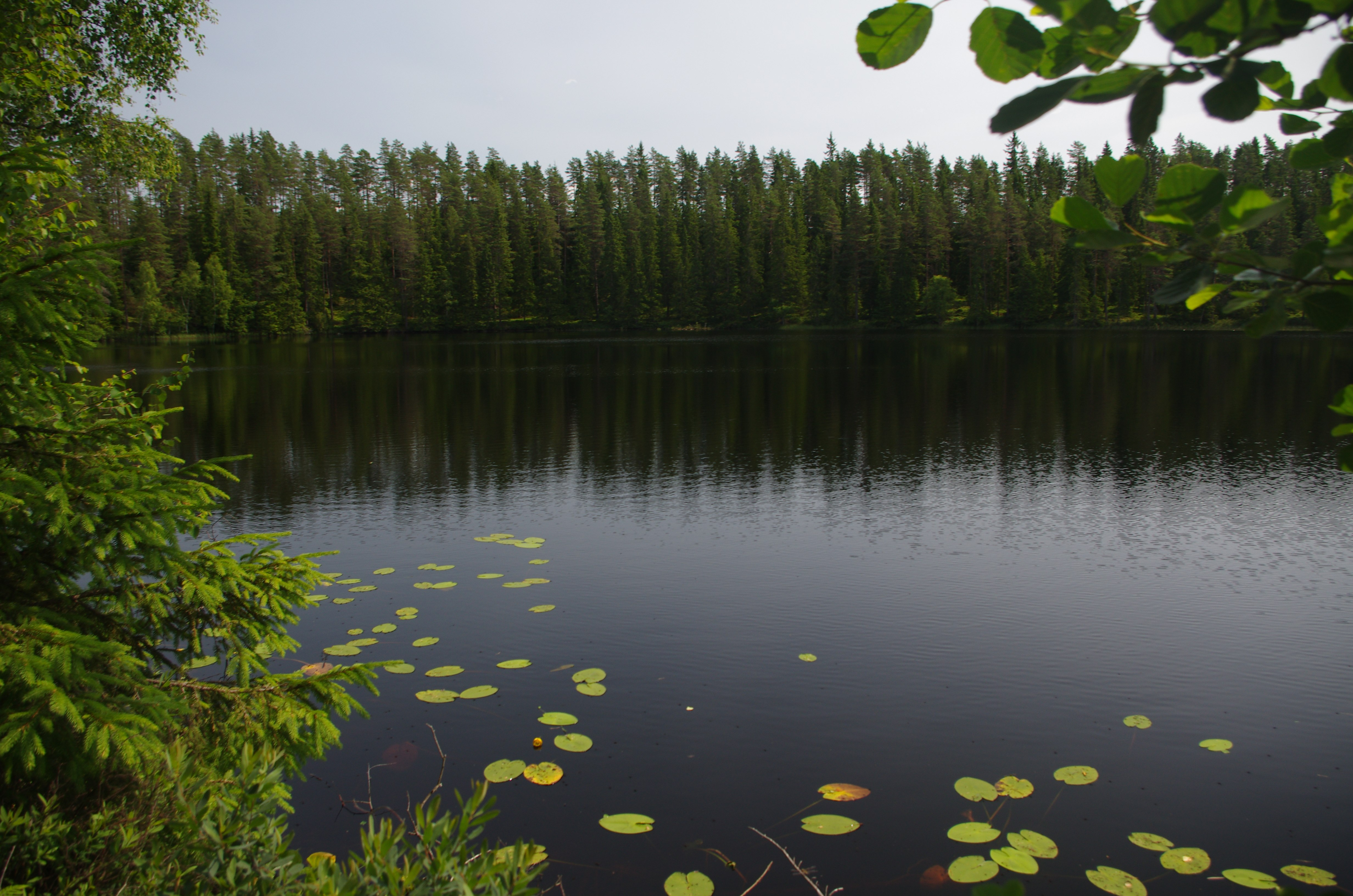 Djupasjön i Gislaveds kommun i Småland i Sverige.